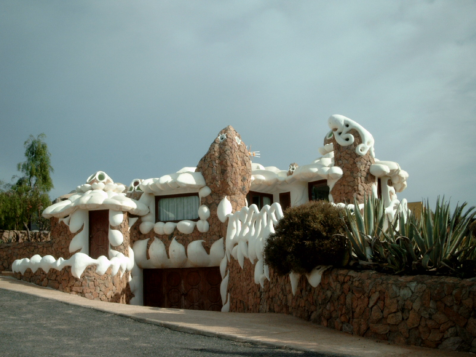 Zuckerhaus in Costa Calma